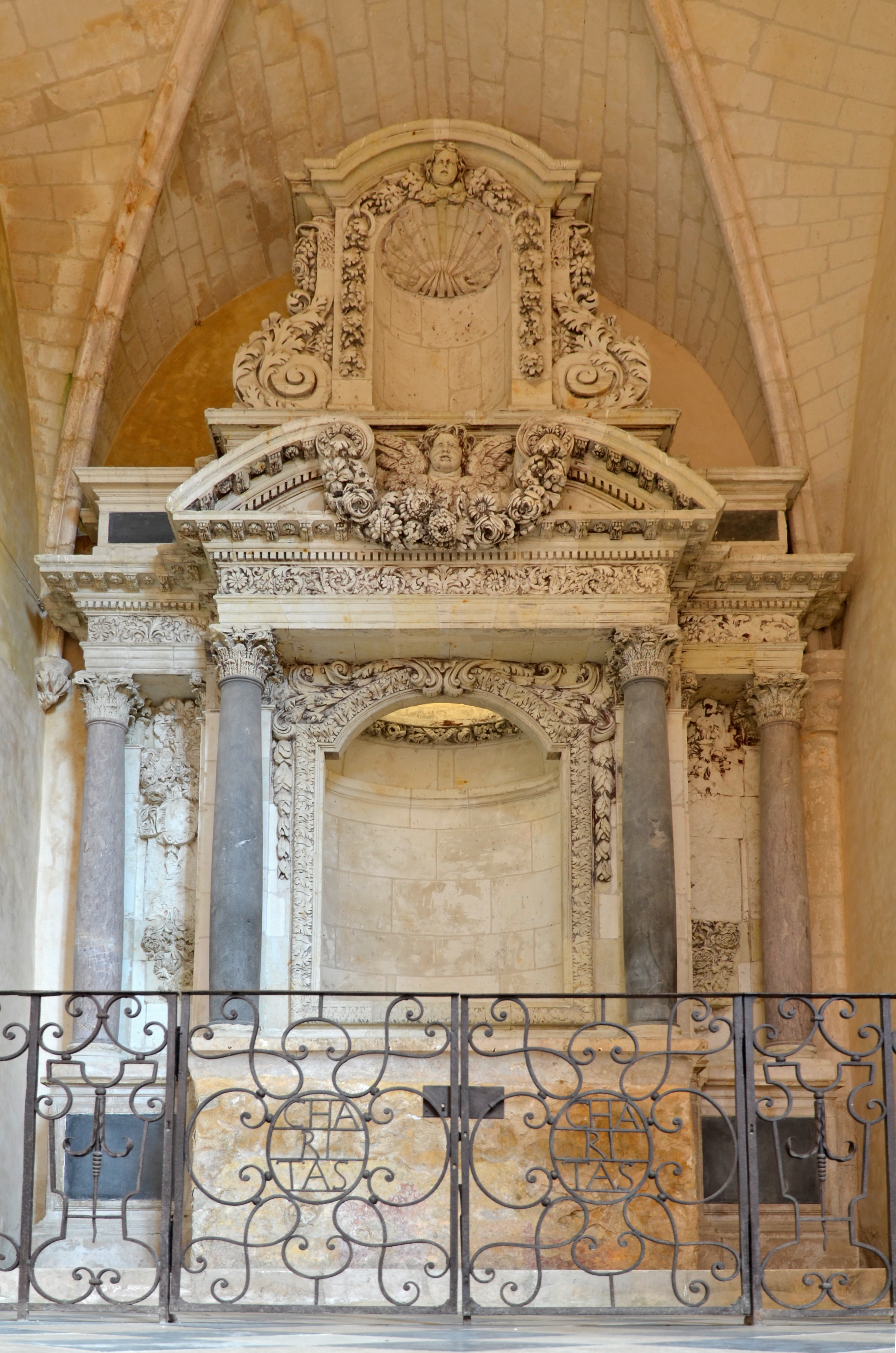 Abbaye de l'Épau - Yvré-l'Évêque, Sarthe .